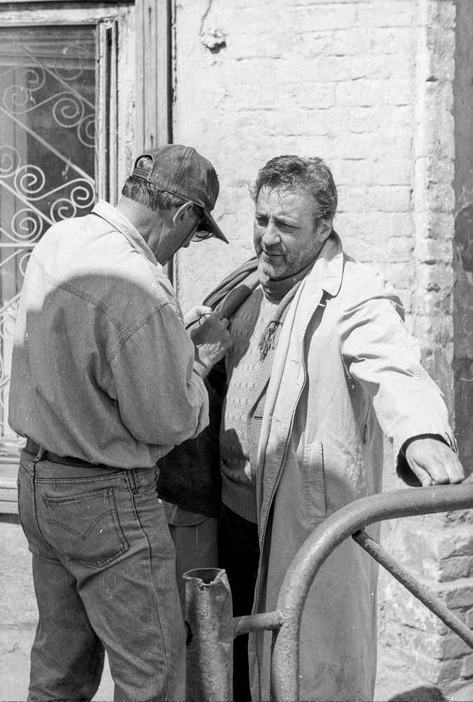 Съёмки кинофильма «Полицейские и воры» в городе Переславле-Залесском на повороте с Ростовской улицы на Плещеевскую улицу. Справа артист Геннадий Викторович Хазанов.